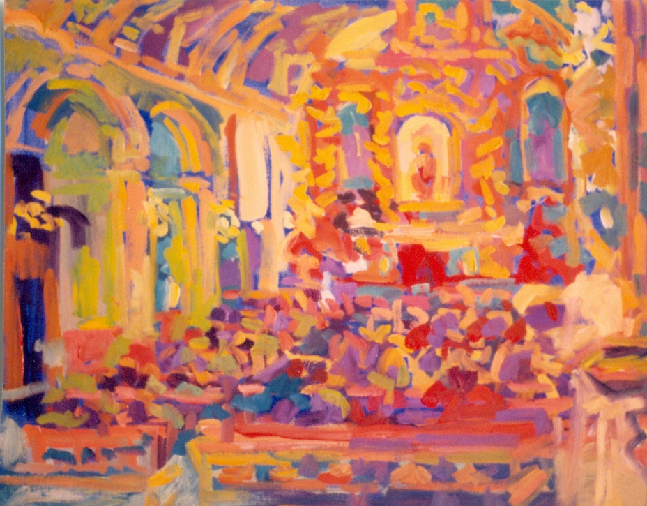 "Fiesta en S. Bartolomé" óleo/lienzo 73 x 92 cm.